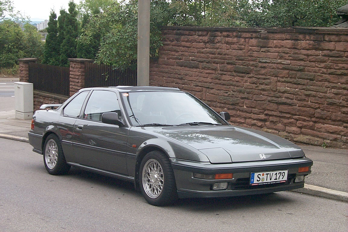 Honda Prelude der dritten Generation. Sonstiges